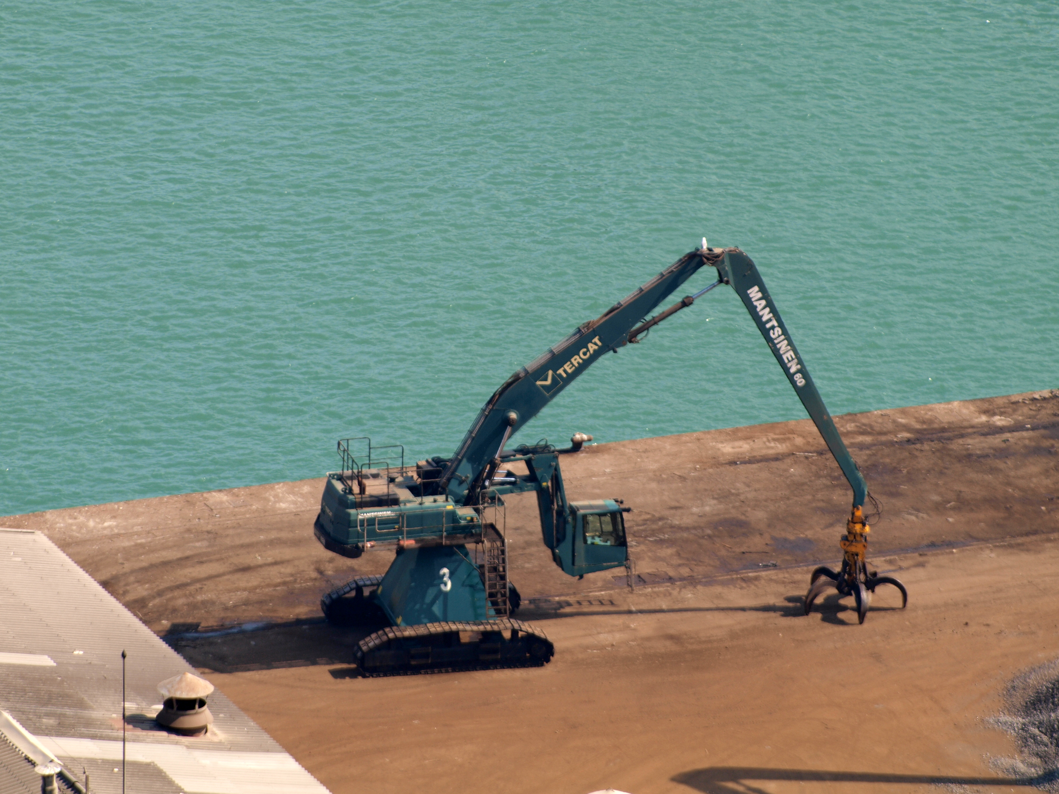 Mantsinen 60